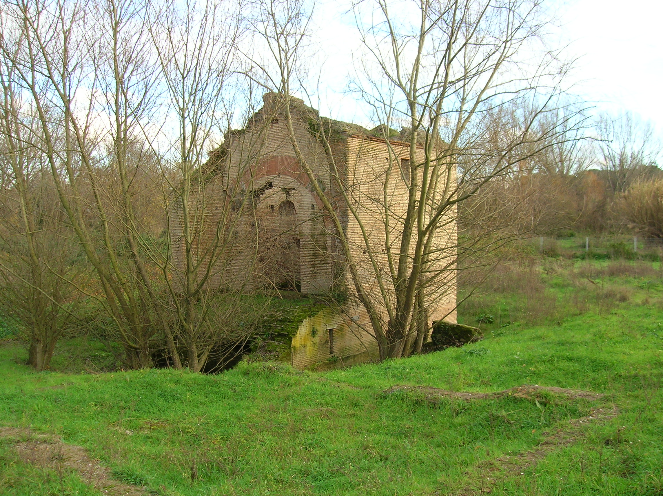 Il Colombario costantiniano nel Parco della Caffarella, Roma, Italia